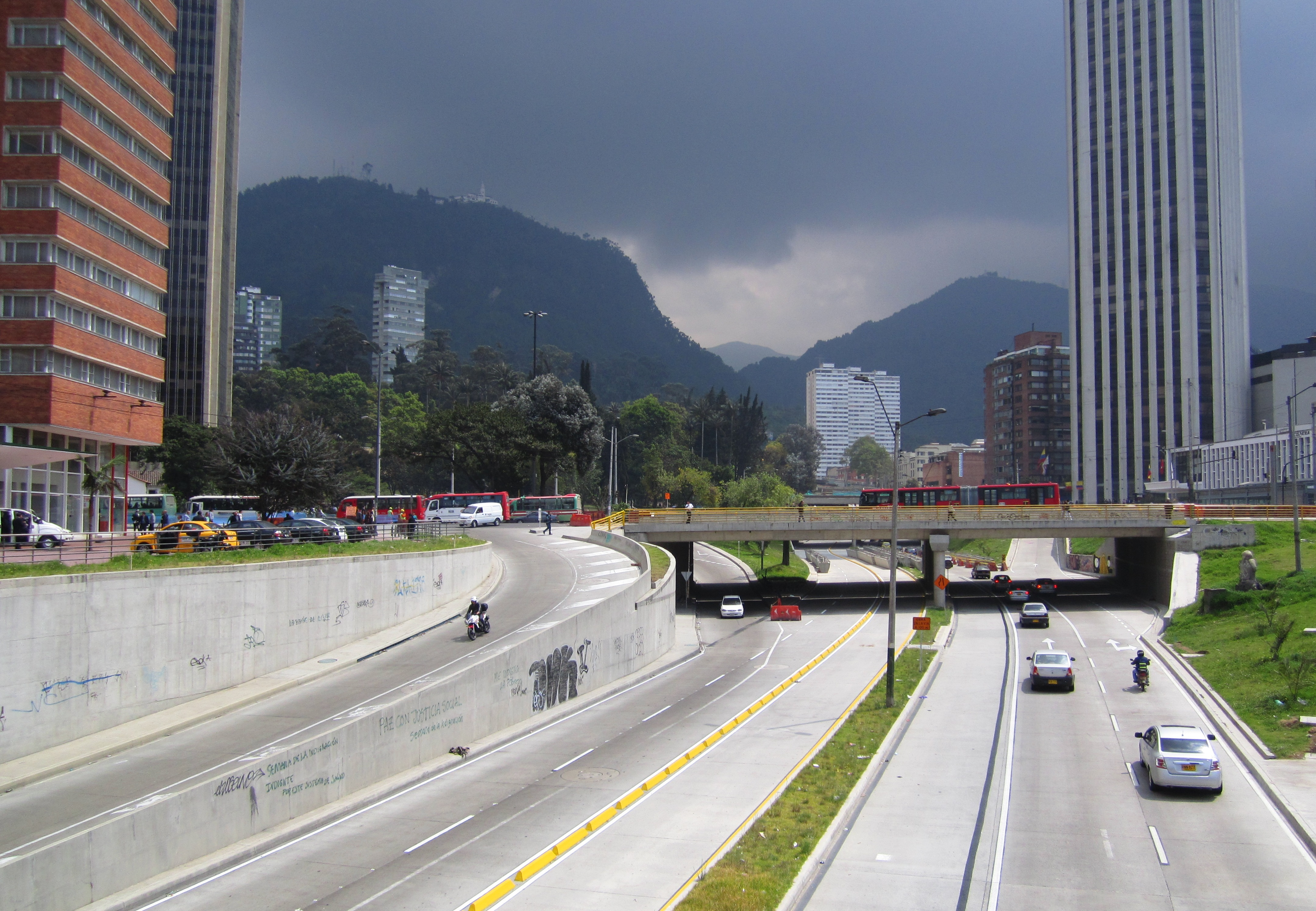 Avenida 26 (Eldorado) con carrera Décima, centro de Bogotá.